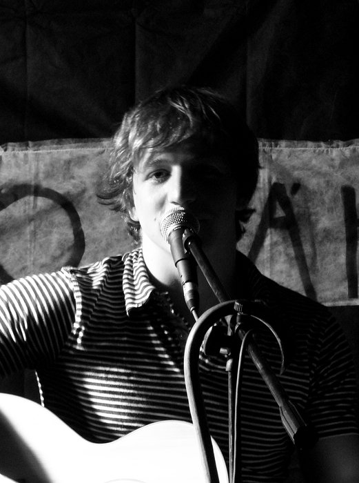 Tomáš Klus, Křest alba Cesta do záhu(d)by, Praha, 2.4.2008